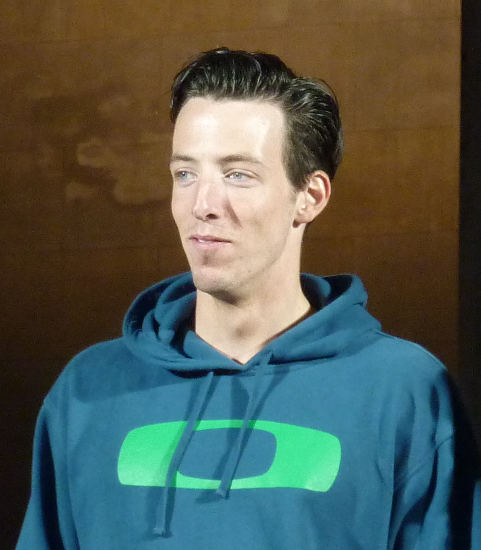 Malte Mohr 2012 Jump & Fly München